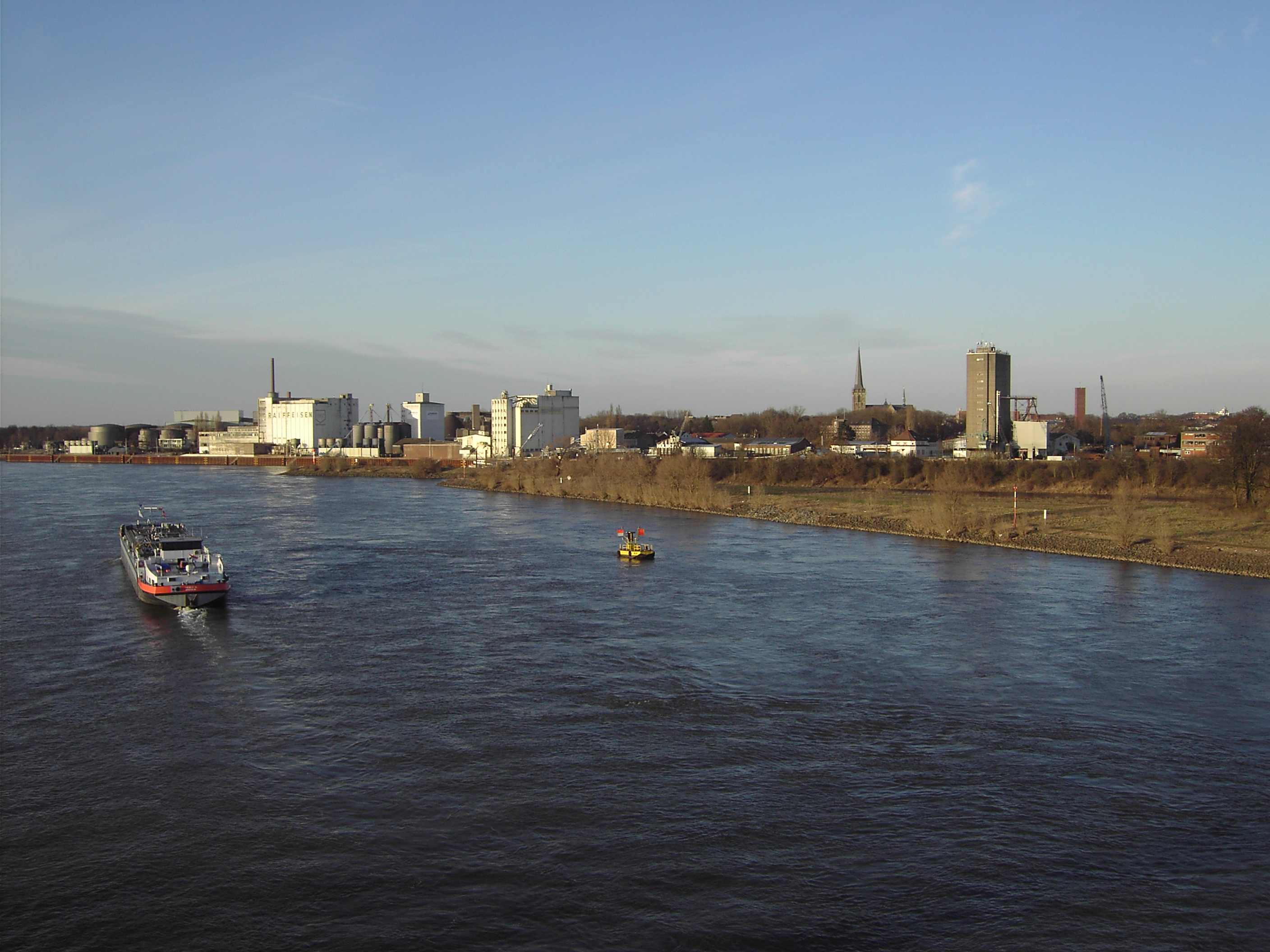 Weseler Stadthafen